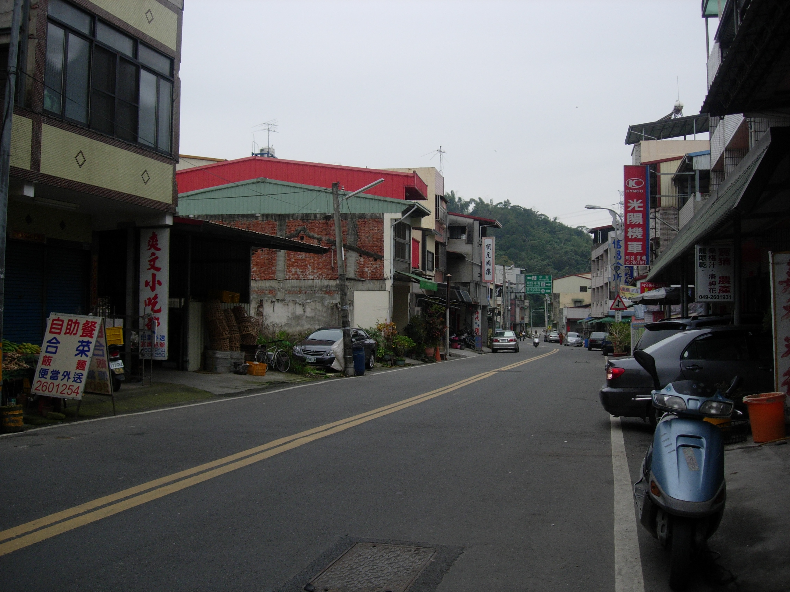 中文（台灣）: 中寮爽文街道一景